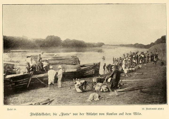 “Anlegestelle am Milo River” - from Expeditionsbericht der Zweiten Deutschen Inner-Afrika-Expedition (1907-09) Auf dem wege nach Atlantis.